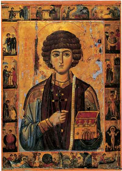 Icon of saint Panteleimon (Saint Catherine's Monastery, Mount Sinai) / Единственная житийная икона св. Пантелеймона византийского времени